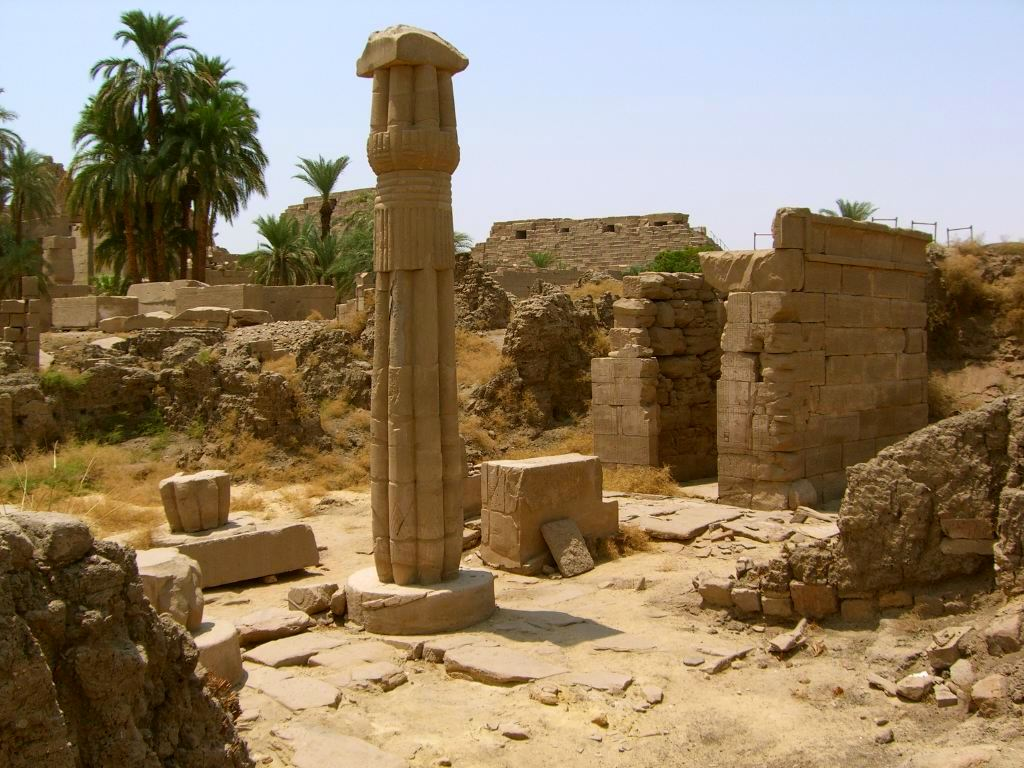 Vue de la chapelle de la divine adoratrice Ânkhnesnéferibrê à Karnak - XXVIe dynastie égyptienne